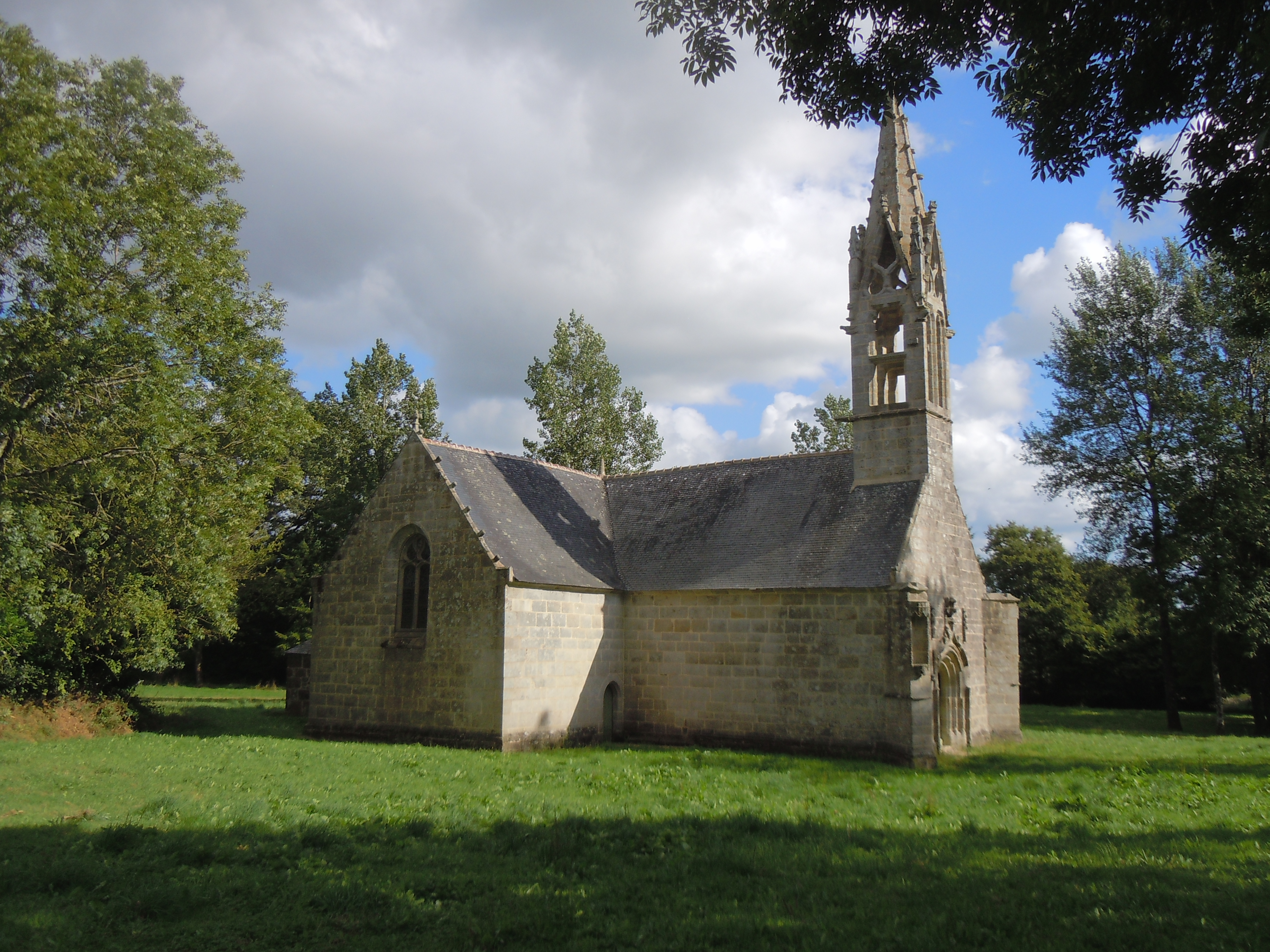 côté latéral nord de la chapelle Saint-Hervé de Gourin dans le département du Morbihan